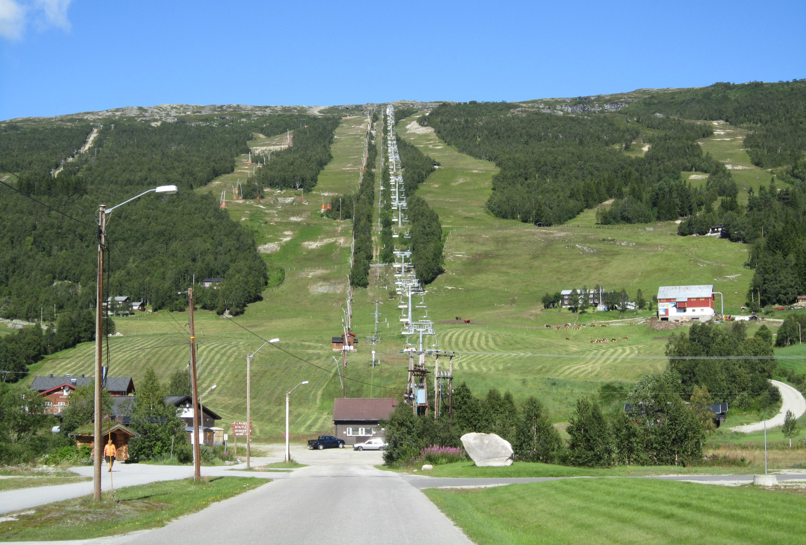 Alpinbakken og skitrekket på Bjorli